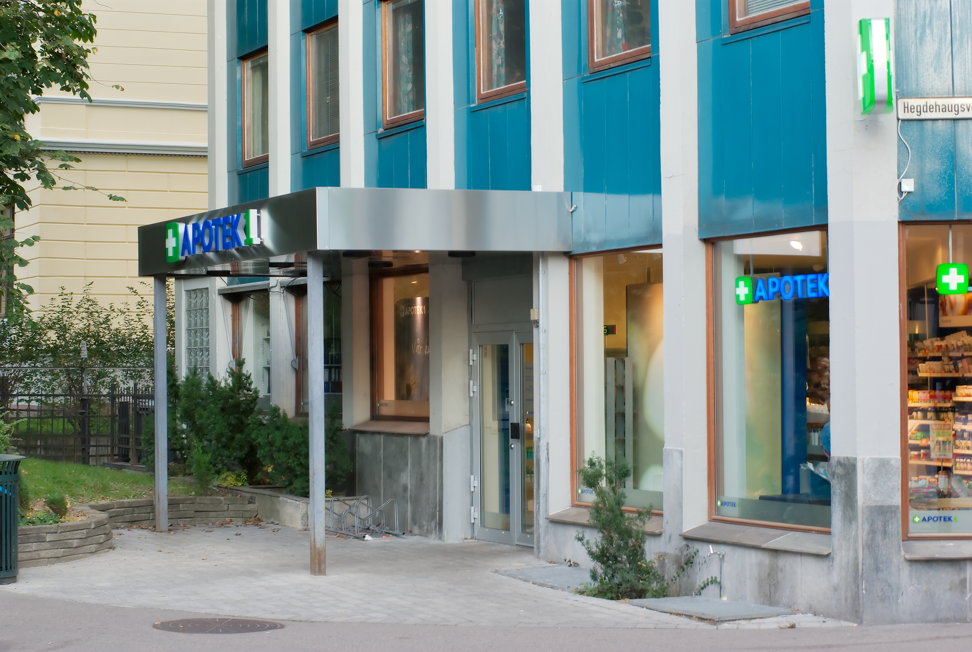 Apotek1 in Hegdehaugsveien in Oslo.